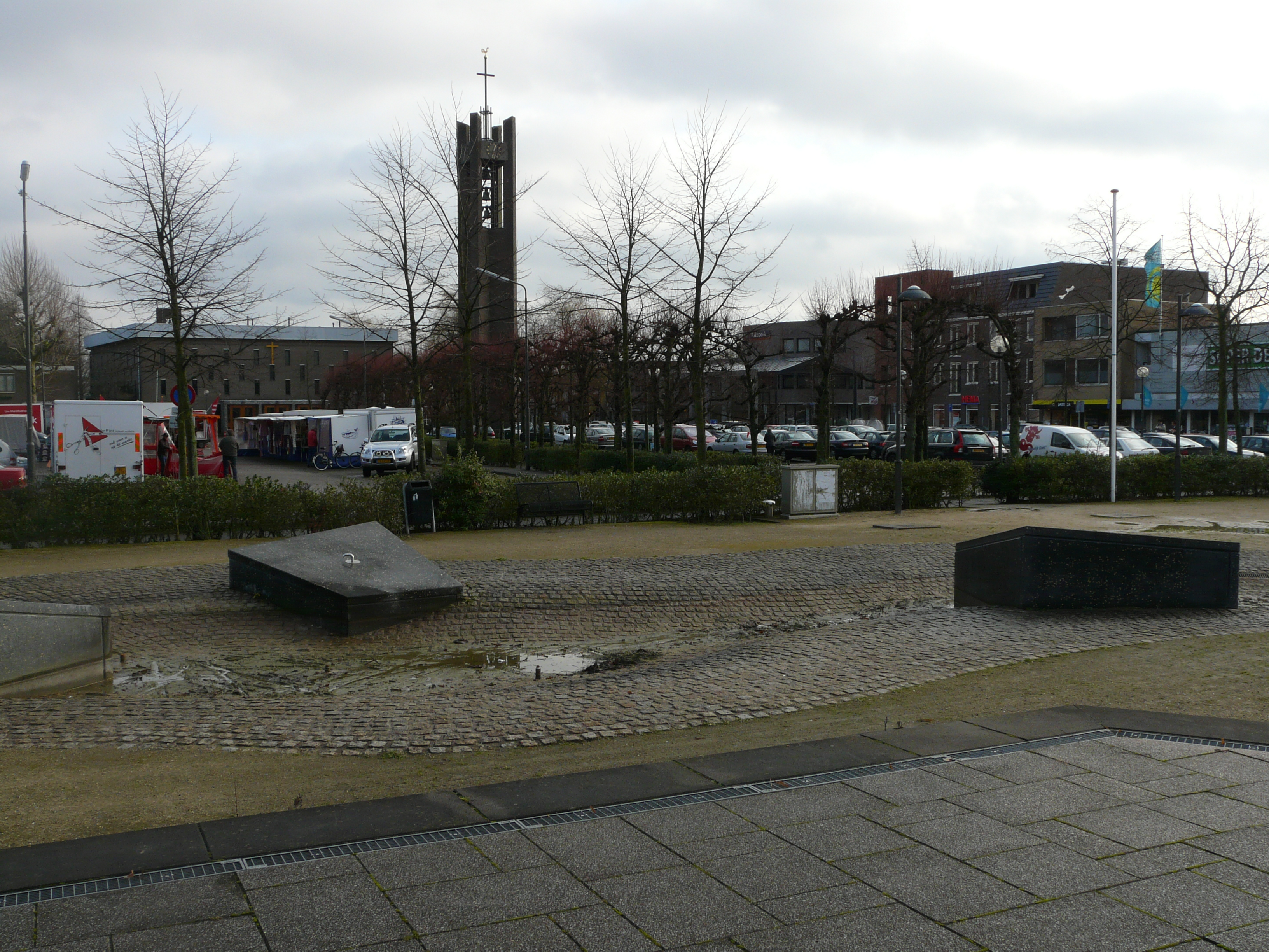 Zicht op een deel van de Markt en de Onze Lieve Vrouw Hemelvaartkerk, Markt 34, 4841 AC Prinsenbeek. Gelegen in het centrum van Prinsenbeek nabij Breda